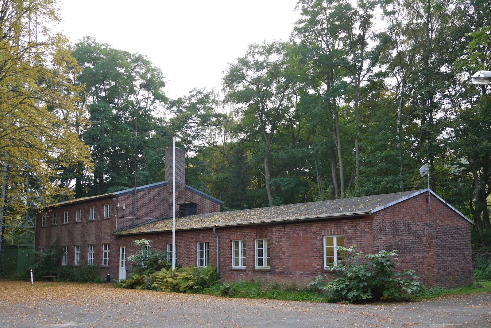 Schachtanlage Hannoversche Treue Nord - ehemaliges Knappschaftsgebäude und Werkstatt - Aufnahme 2010